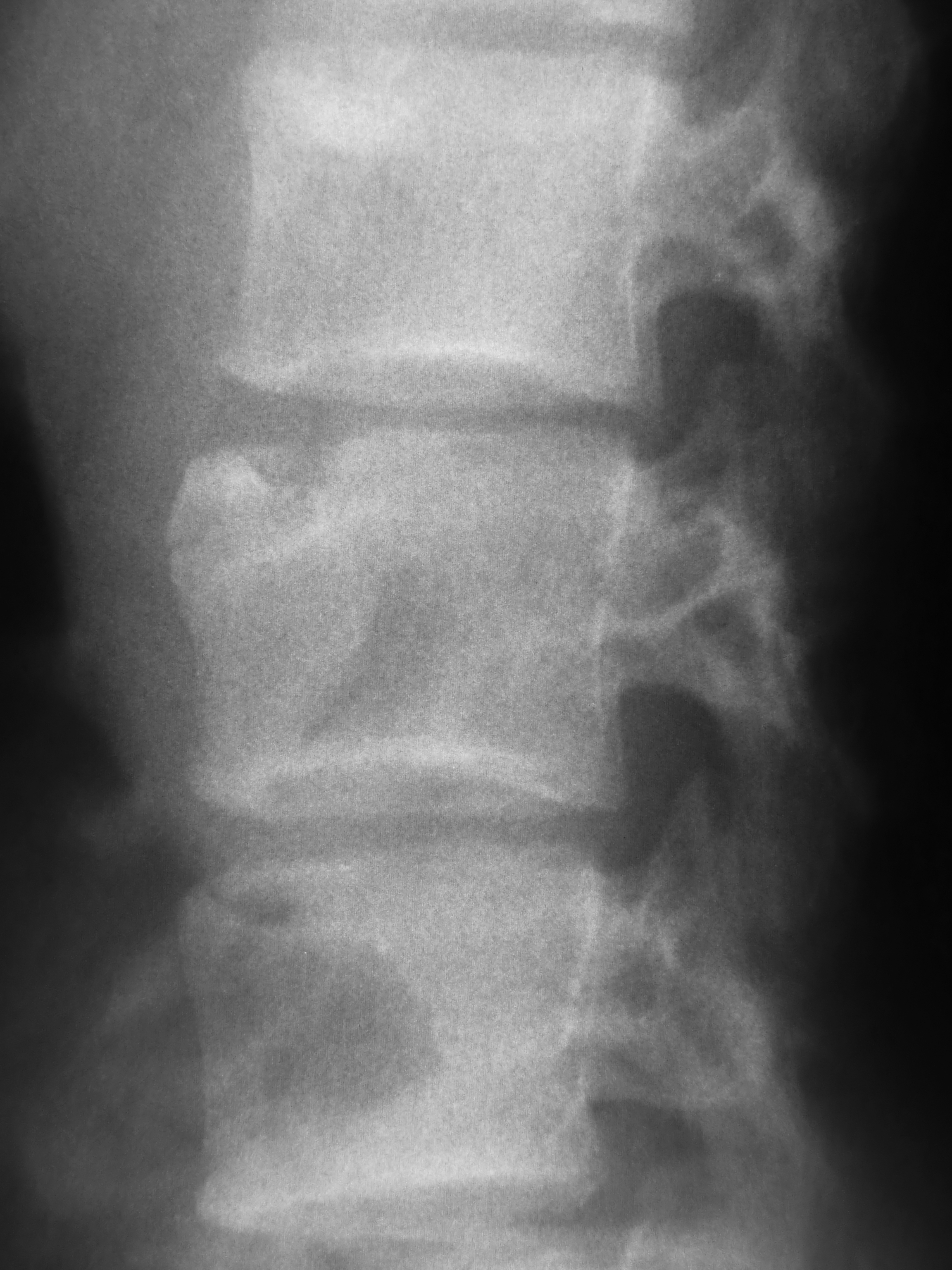 Medical X-rays